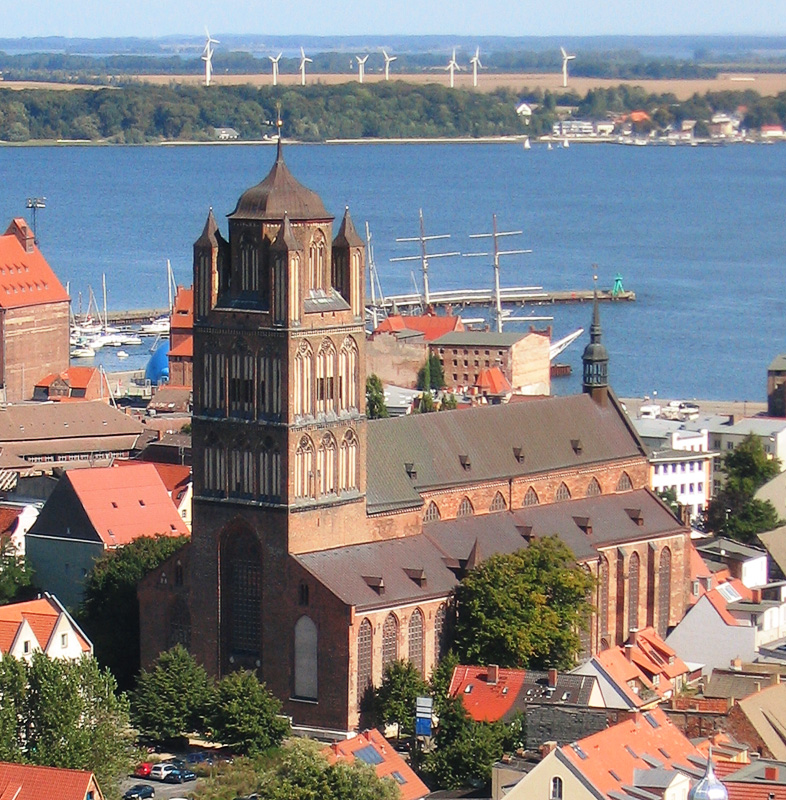 Beschreibung: St. Jakobi Kirche von der Marienkirche aus betrachtet Fotograf: Darkone, 10. September 2004